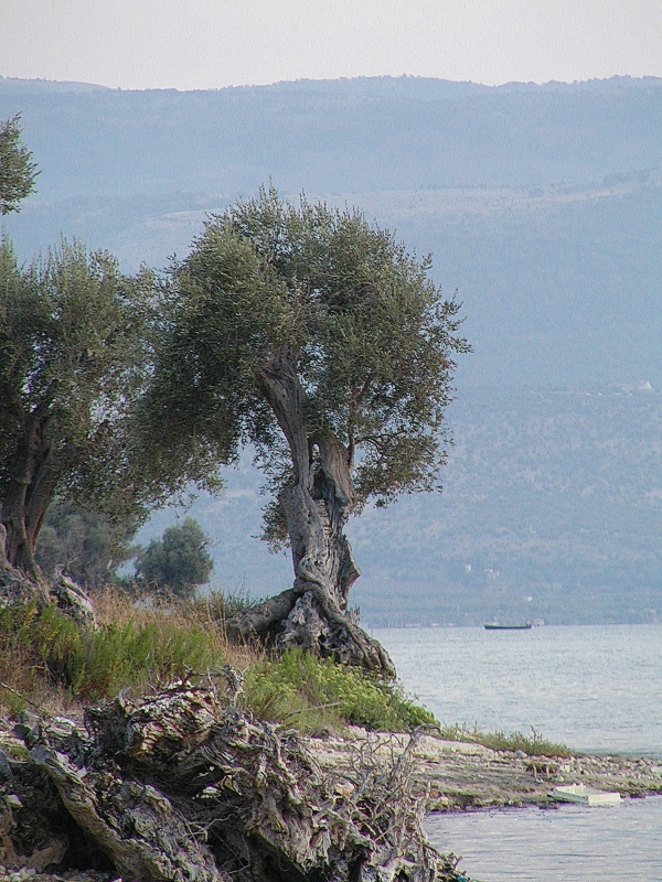 Lago di Varano Contrada Chianca (Parco Nazionale del Gargarno)